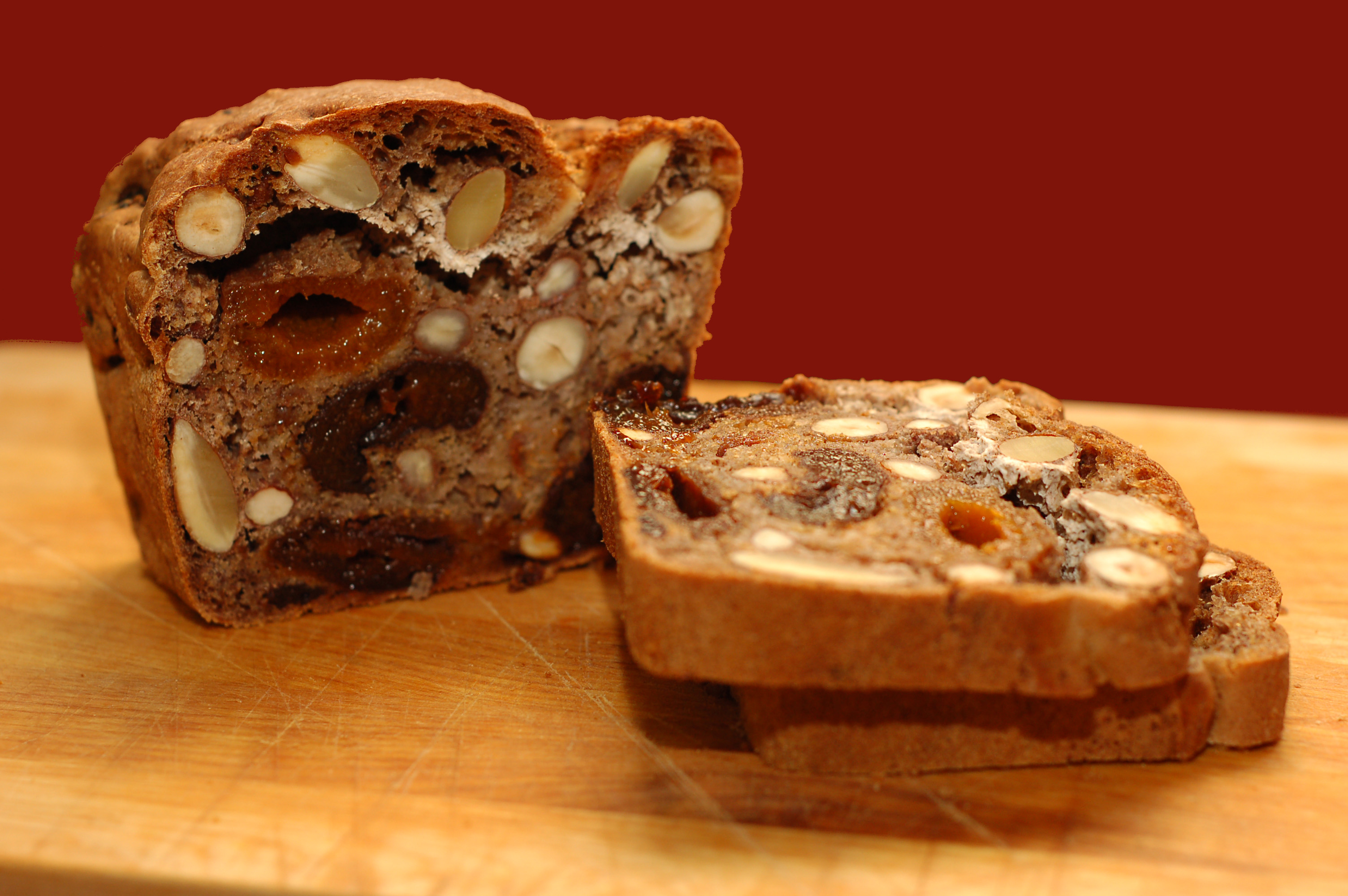 Früchtebrot